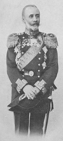 Вице-адмирал Гильтебрандт